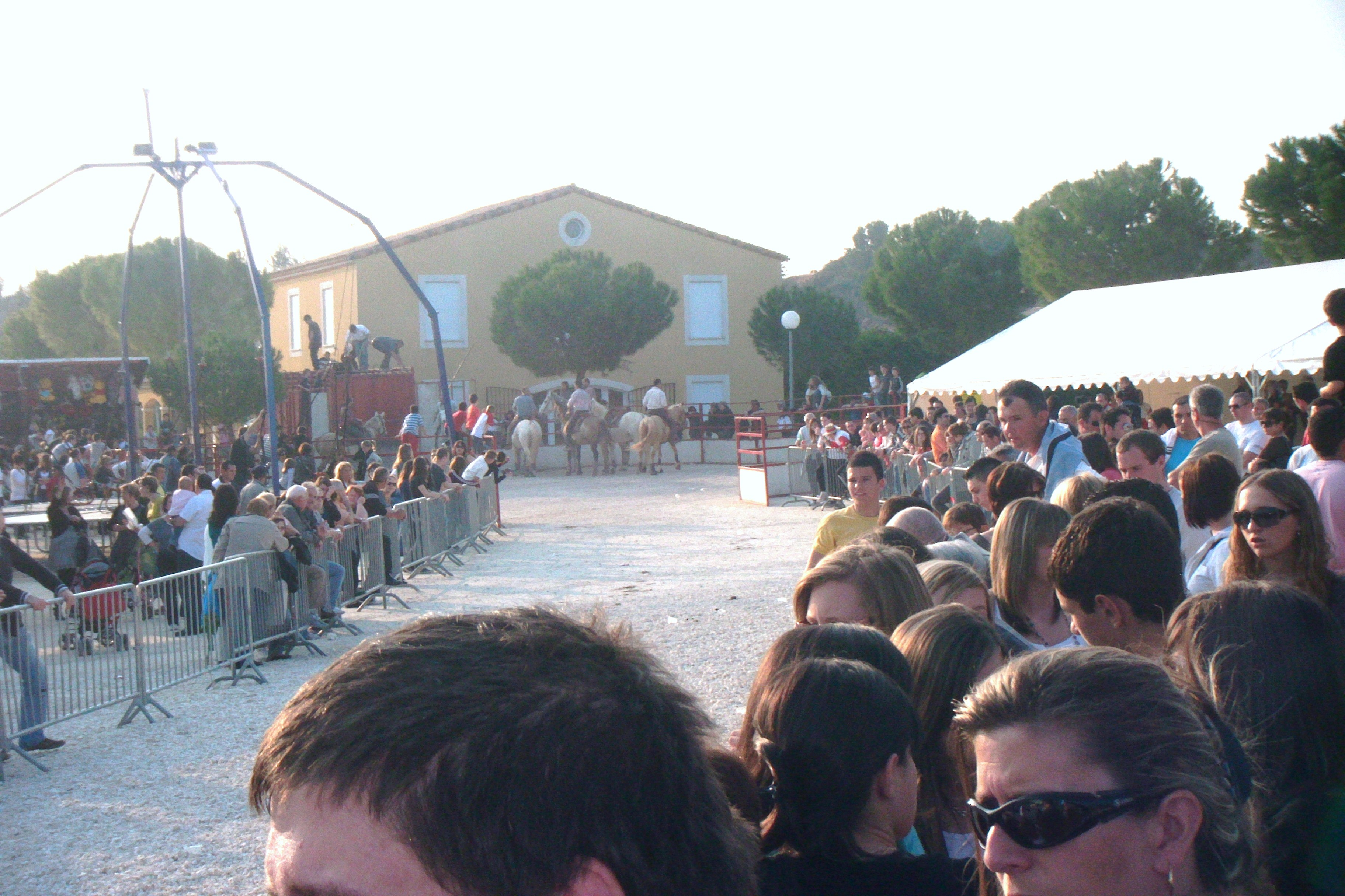 La fête de Pâquettes à Domessargues se déroulant une semaine après Pâques.